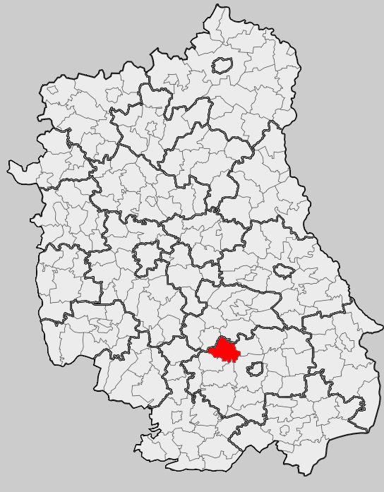 Map of gmina Nielisz, Zamość county, Lublin voivodship Mapa gminy Nielisz, powiat zamojski, województwo lubelskie